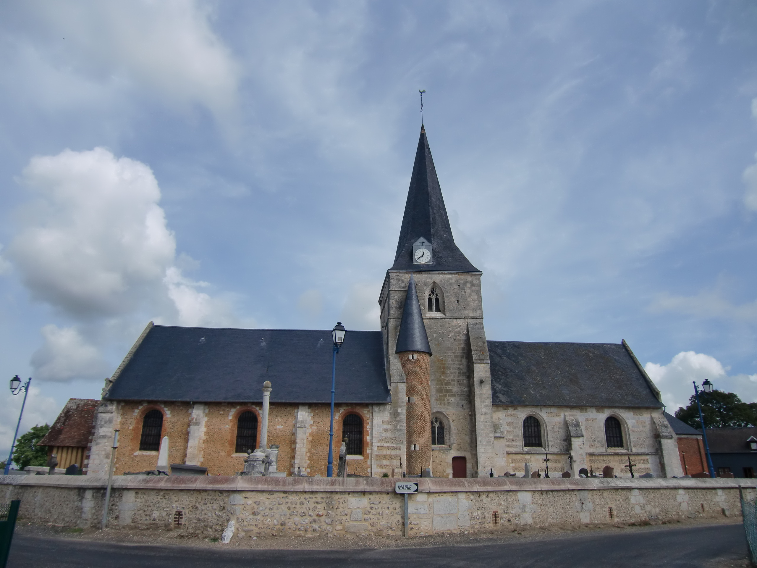 église Saint-Martin de Rougemontiers (Eure, Normandie, France)